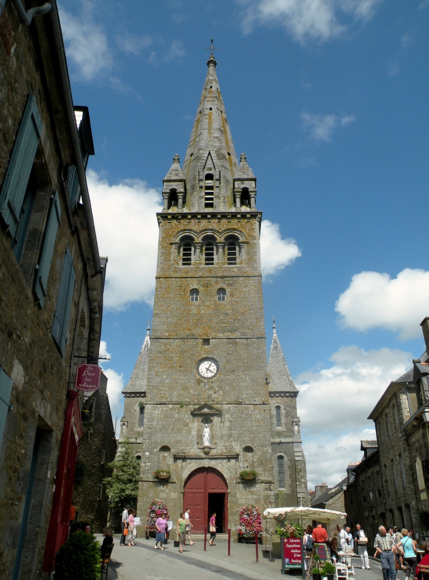 Ille-Et-Vilaine Becherel Eglise Notre-Dame